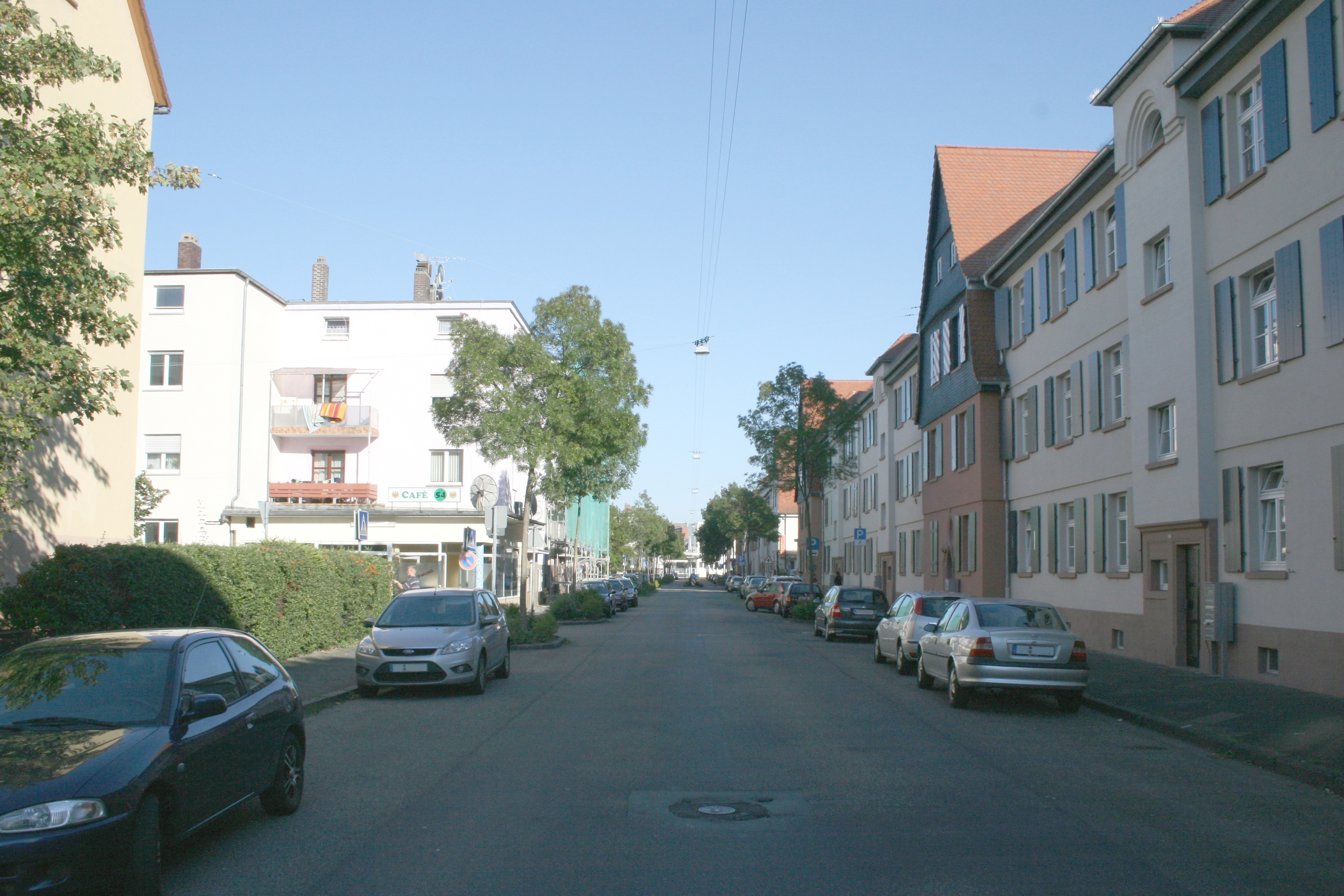 Ansicht der Freigerichtstraße in Hanau, Blick nach Osten.